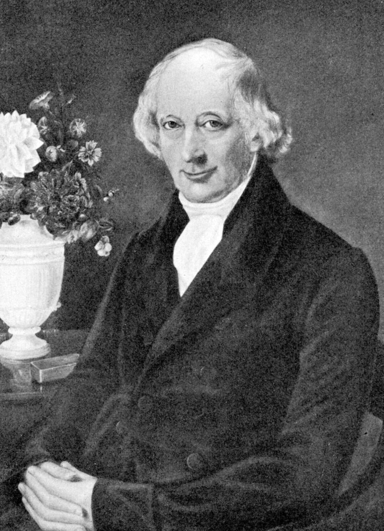 John Nonnen (1770–1845).